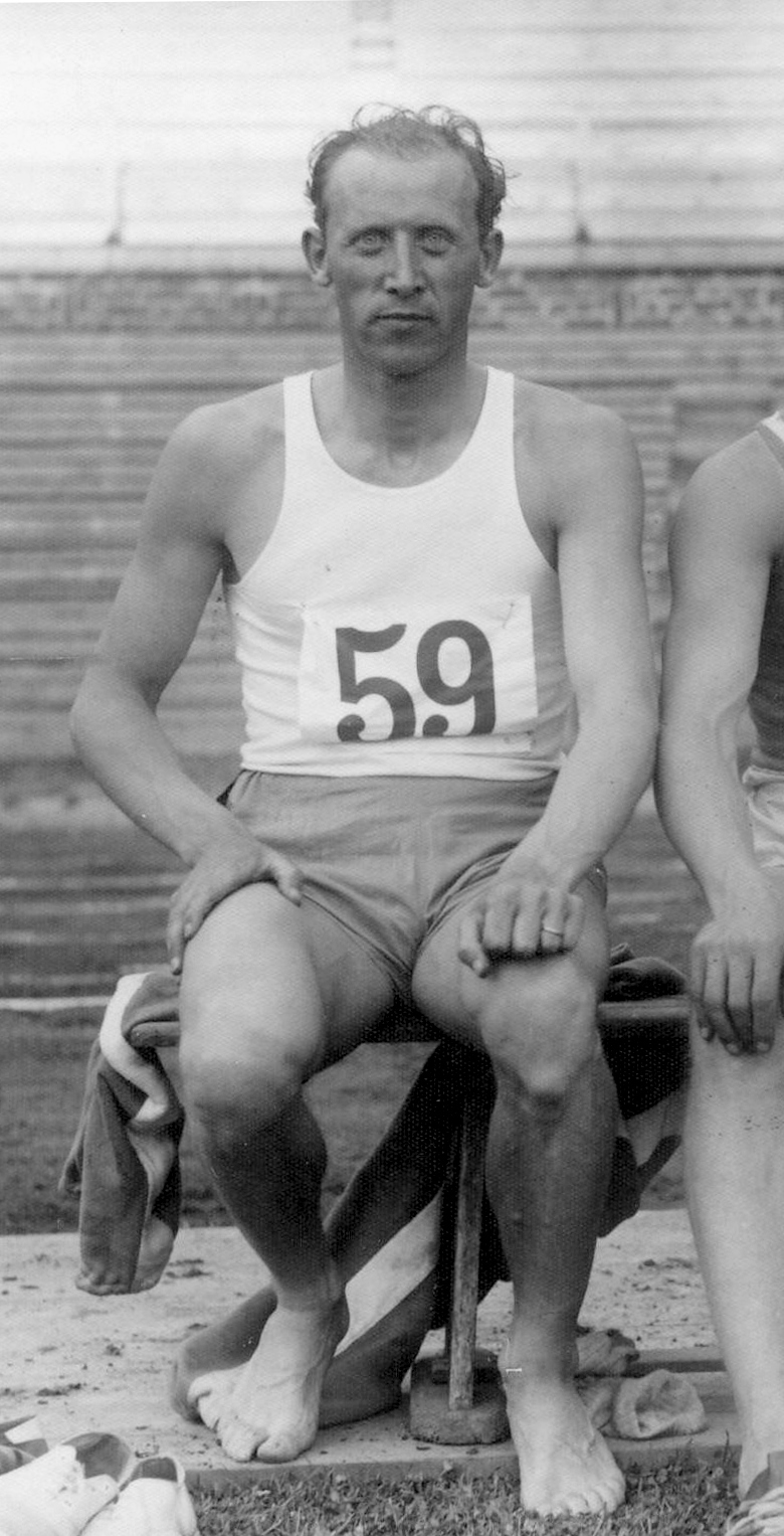 Erik Svensson